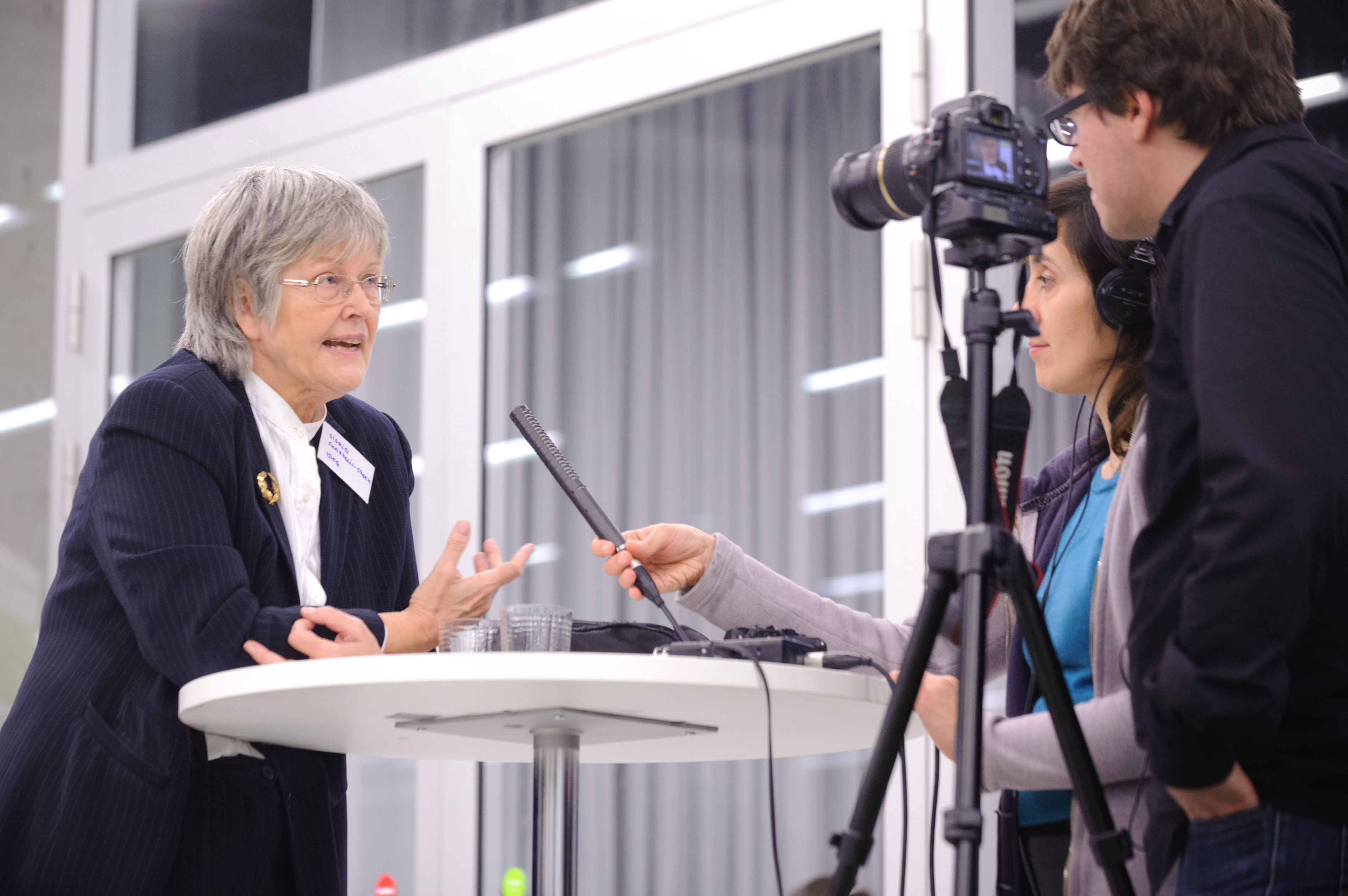 im Interview: Sigrid Skarpelis-Sperk (Vereinigung der Deutsch-Griechischen Gesellschaften e.V.) Konferenz: Hellas in der Krise Foto: Stephan Röhl